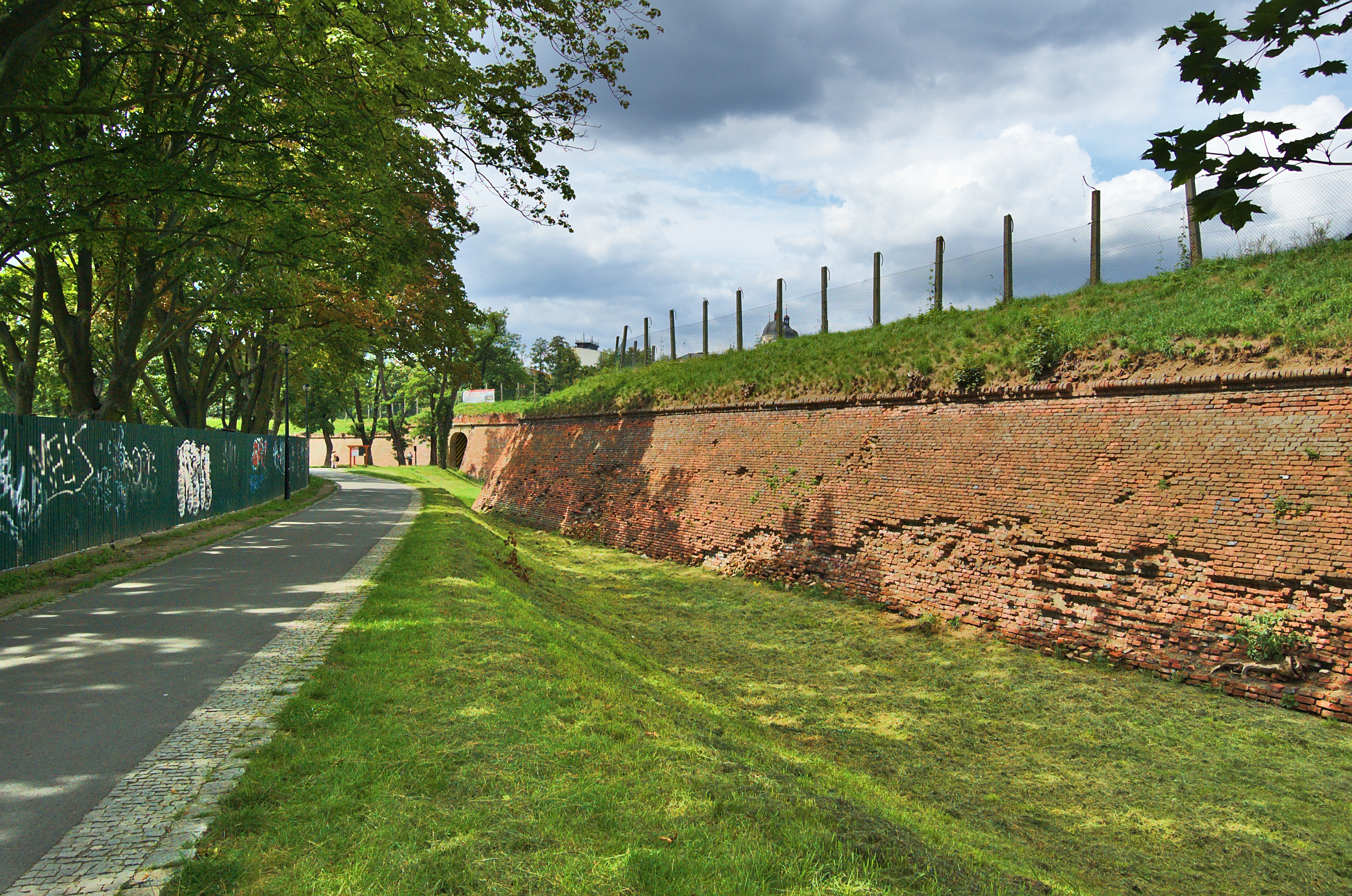 Pevnost, Olomouc